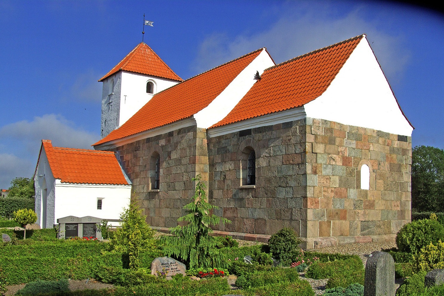 fra sydøst